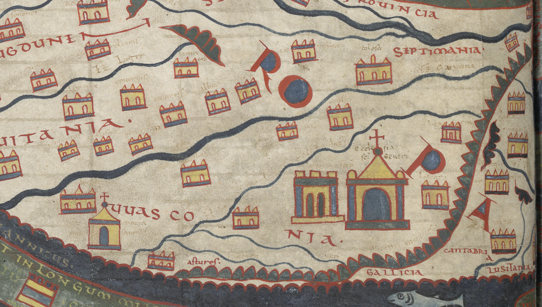 Mappemonde